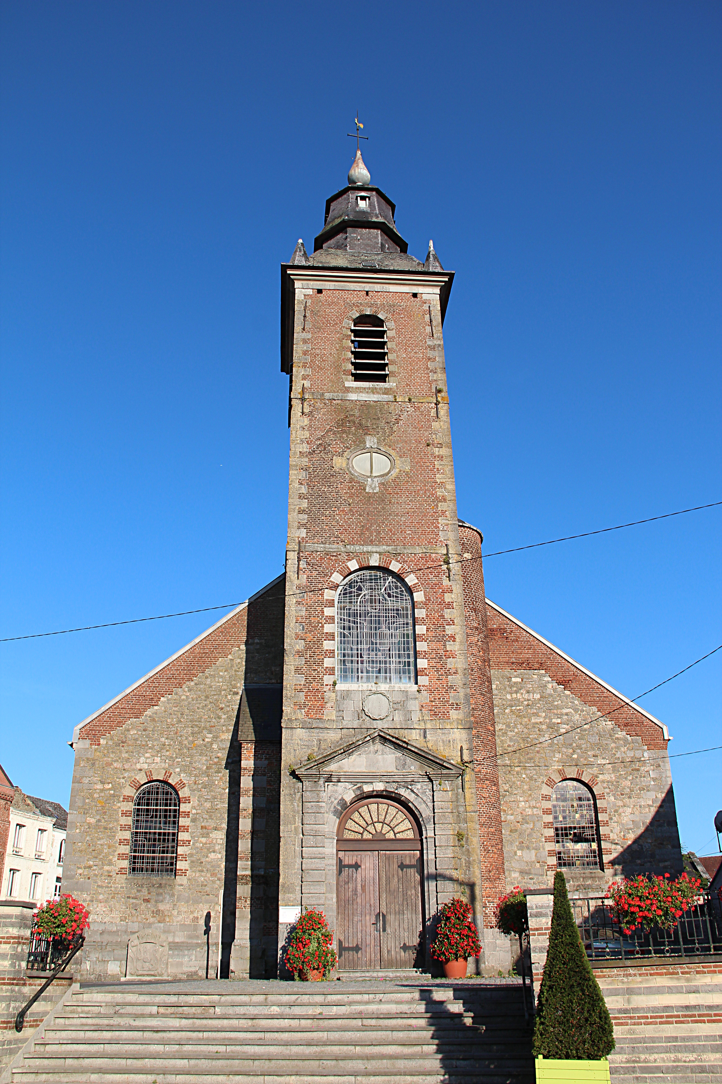 L’église Notre-Dame de l’Assomption de ville Bavay (département du Nord, France).